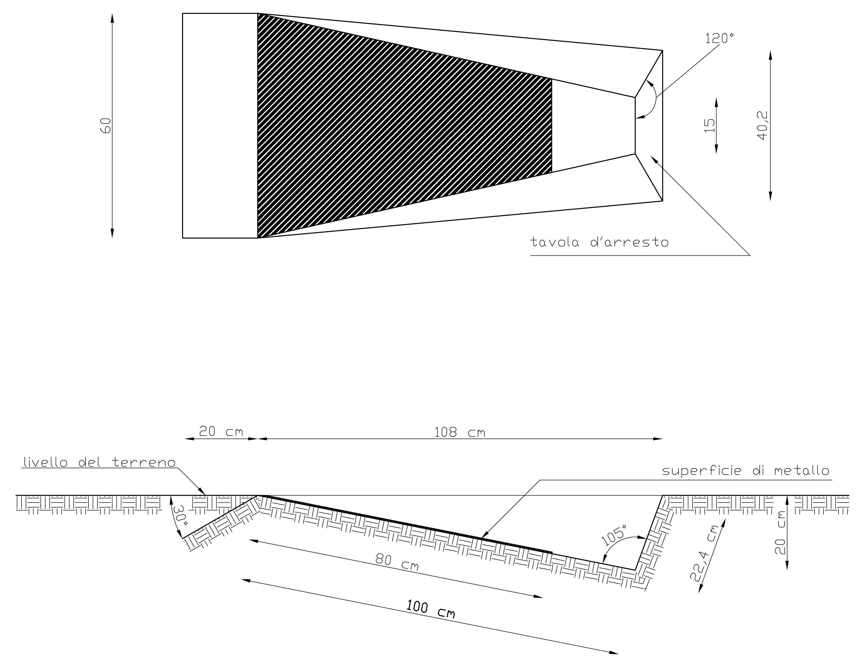 Cassetta d'imbucata depedana del salto con l'asta.